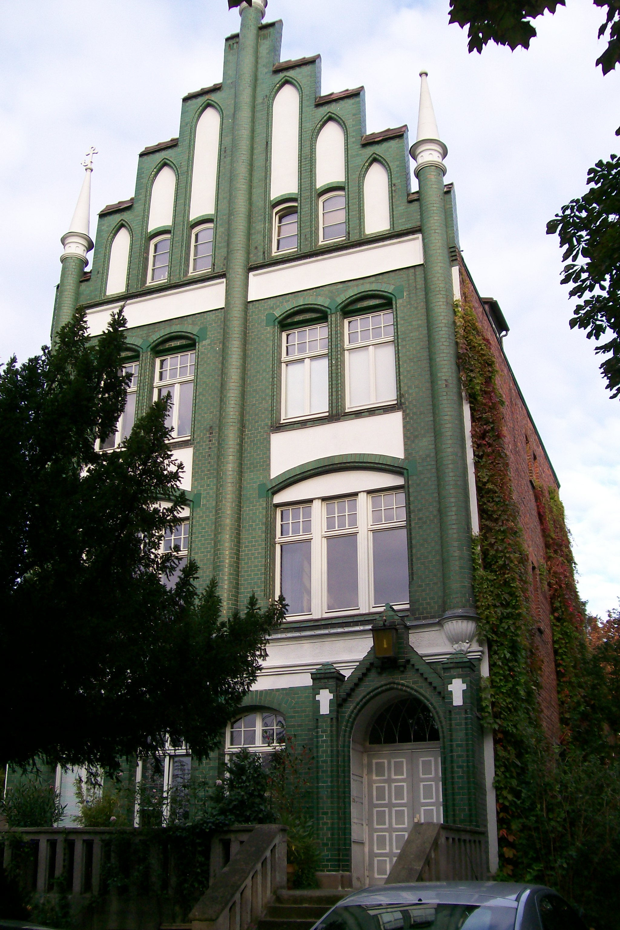 Schwedische Kirche in der Hafenstraße in Lübeck, eigentlich Svenska Kyrkan, gebaut 1904, bis 1968 als Kirche der Schwedischen Staatskirche genutzt, letzter Gottesdienst 1968, jetzt Wohnhaus